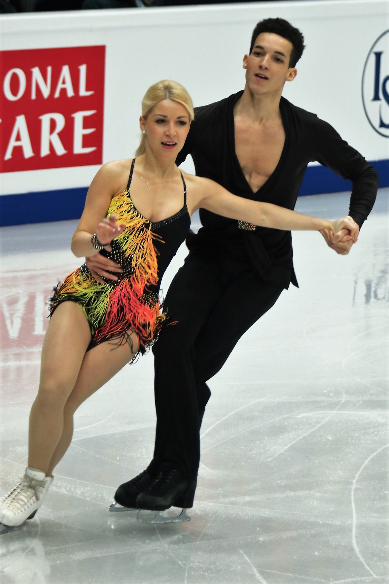 Юстина Плутовска и Жереми Флемин (Польша) на Чемпионате Европы по фигурному катанию 2018.